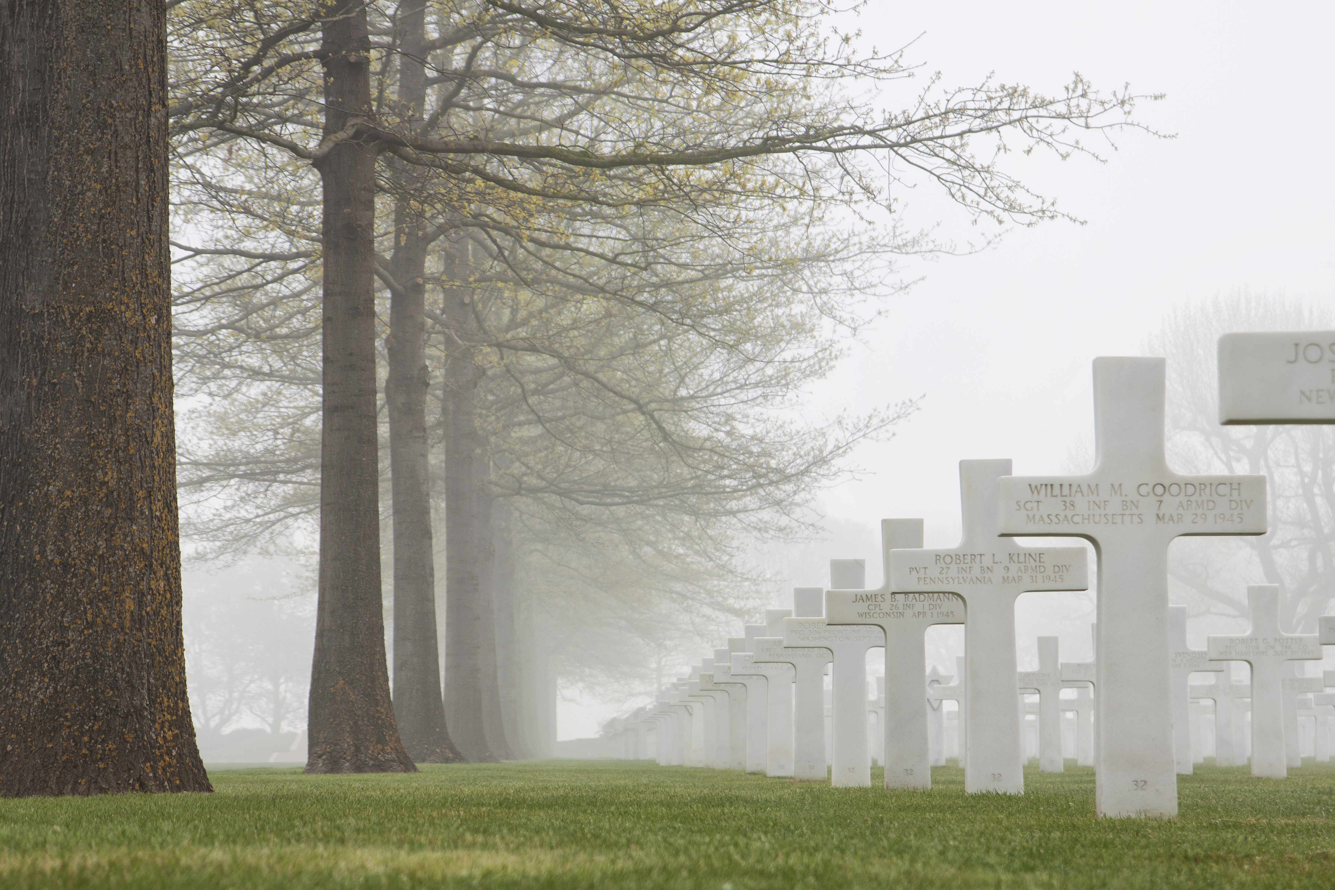 Vanuit een laag standpunt, dicht bij de aarde.